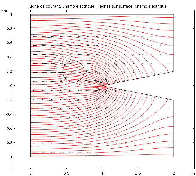 Simulation des lignes de champs. Effet de pointe + présence d'un objet de permittivity rel 3.